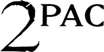 logo rapero